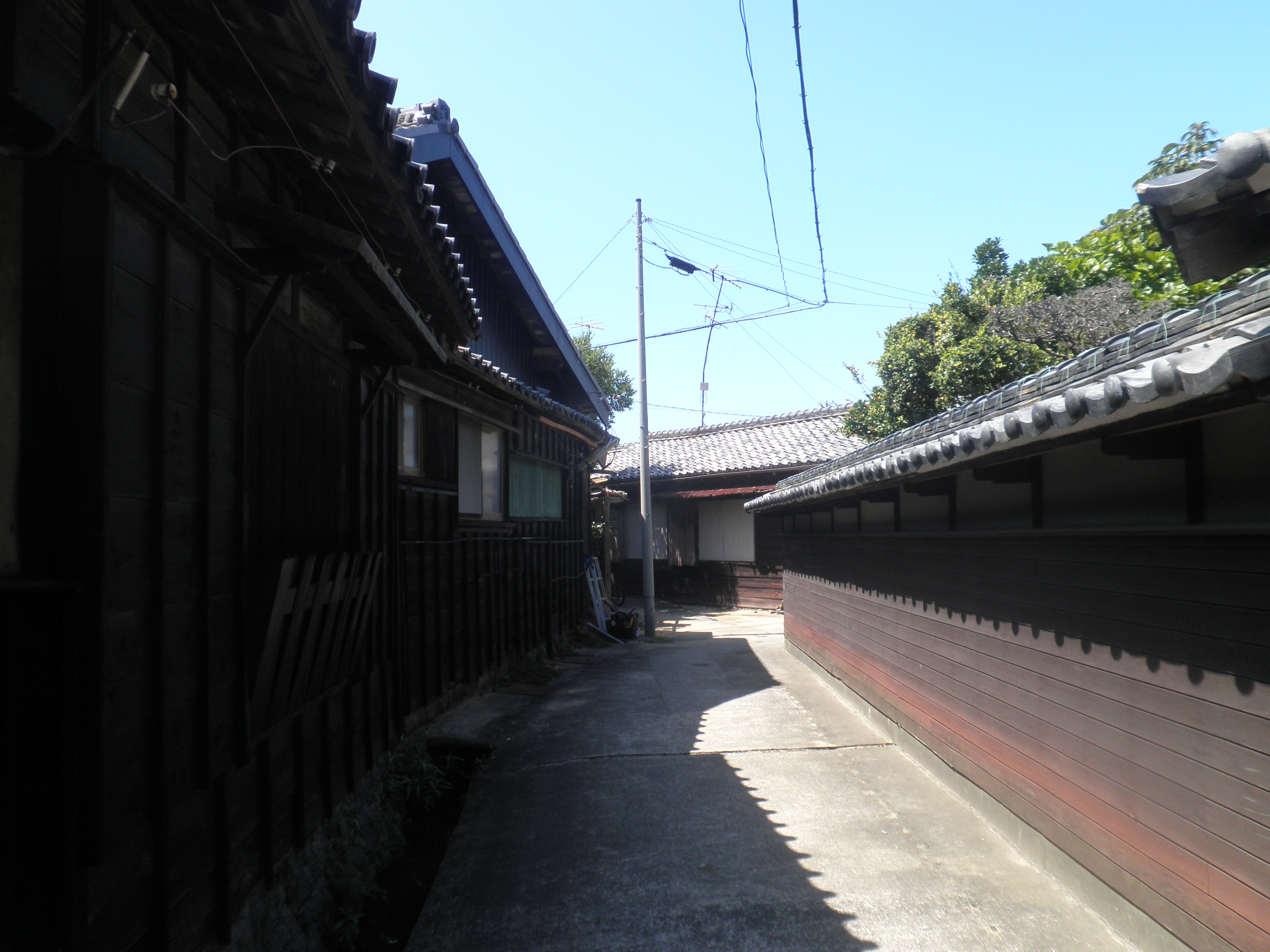 三河湾の黒真珠と呼ばれる佐久島の町並み